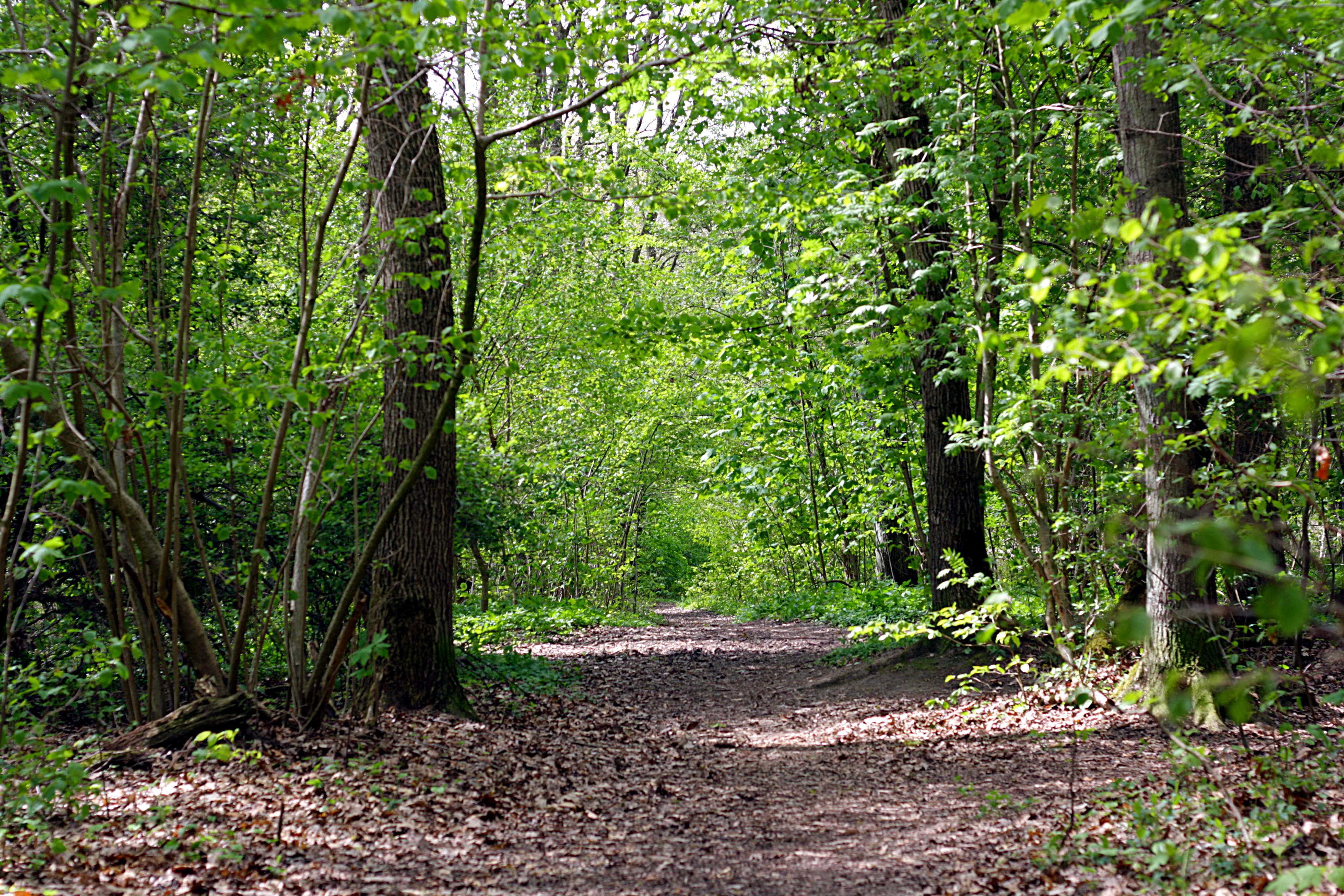 Naturschutzgebiet "Lammer Holz" (NSG BR 072), Braunschweig, Niedersachsen